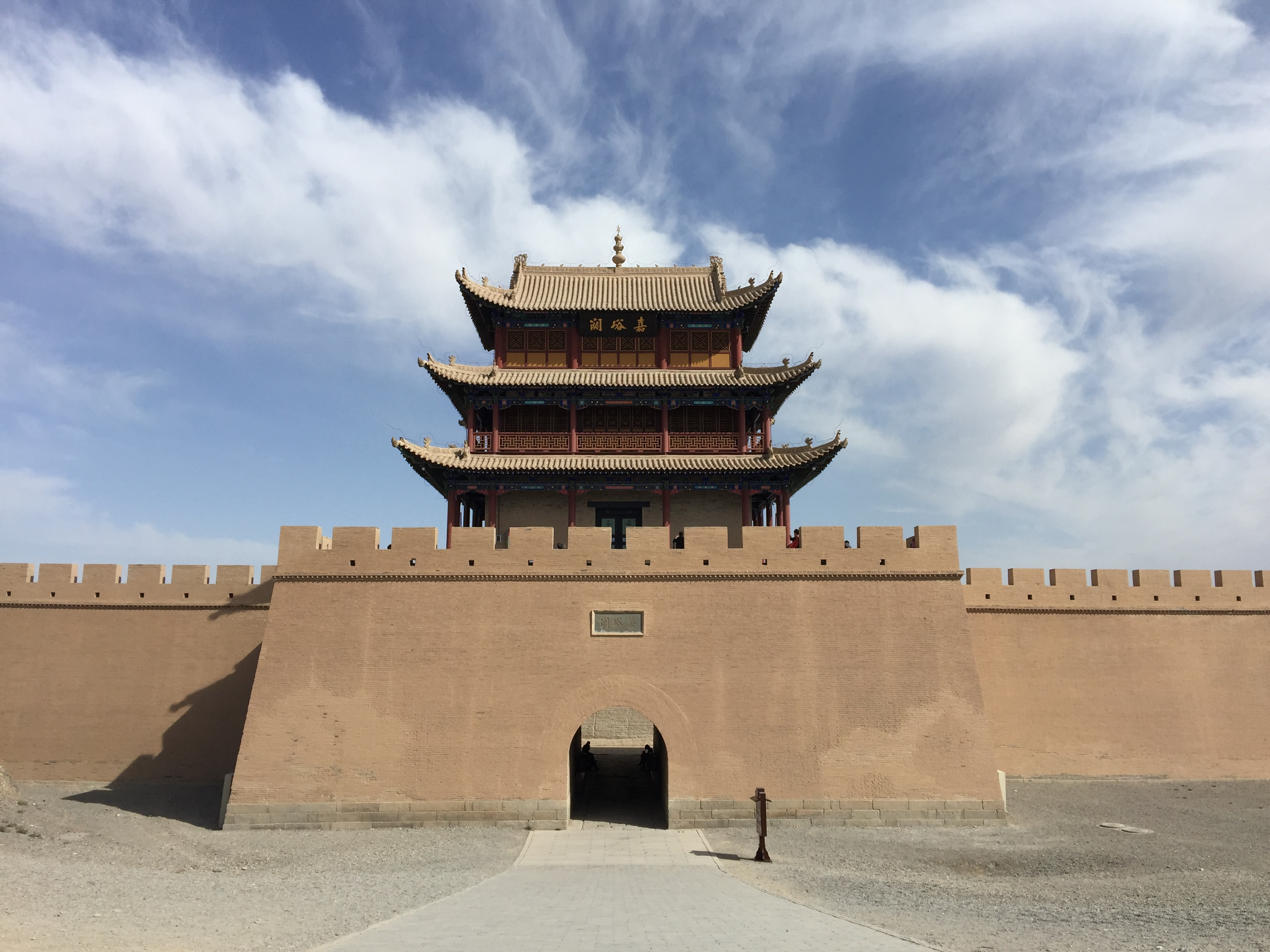 嘉峪关城门